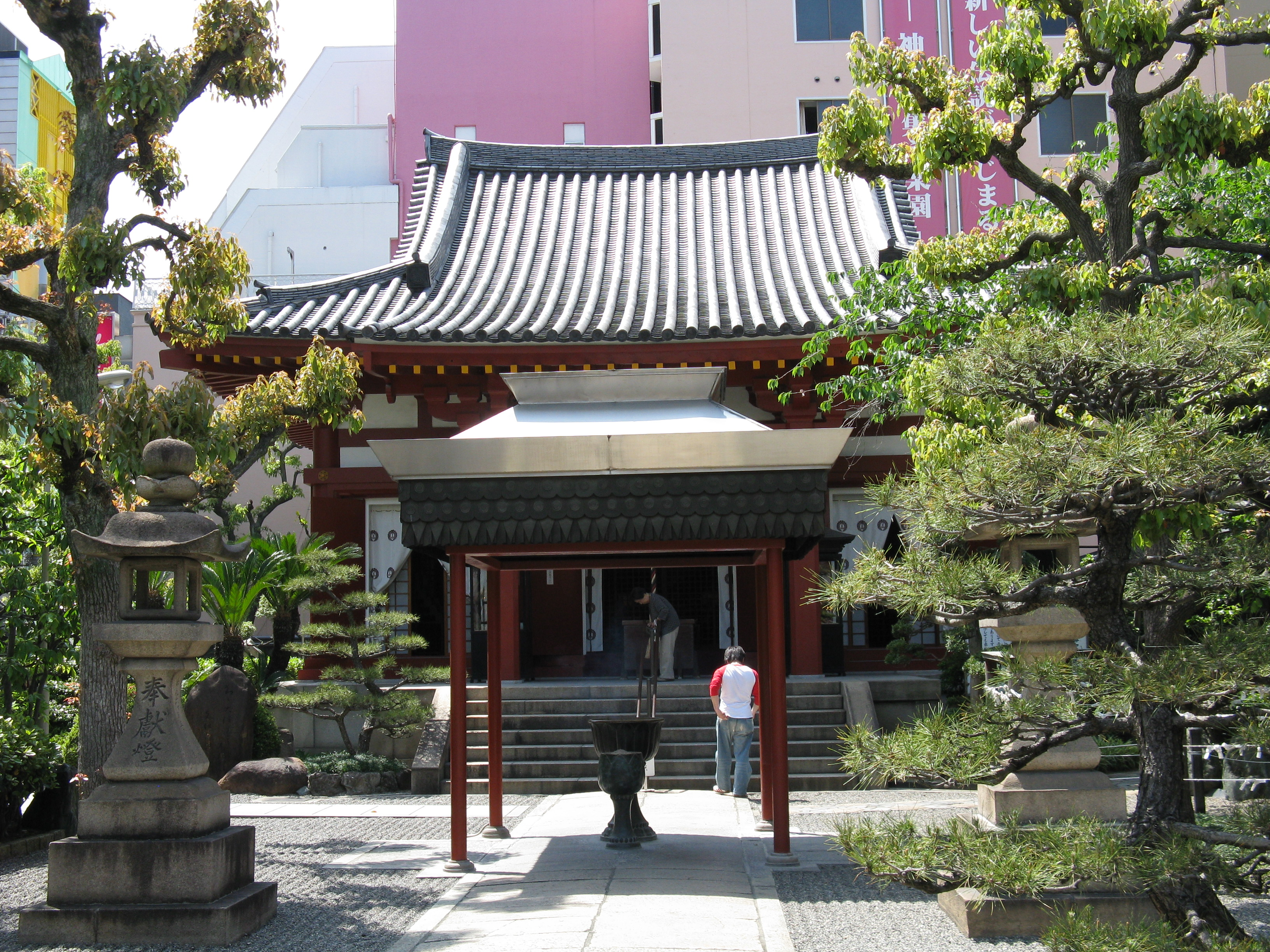 藤次寺 本堂